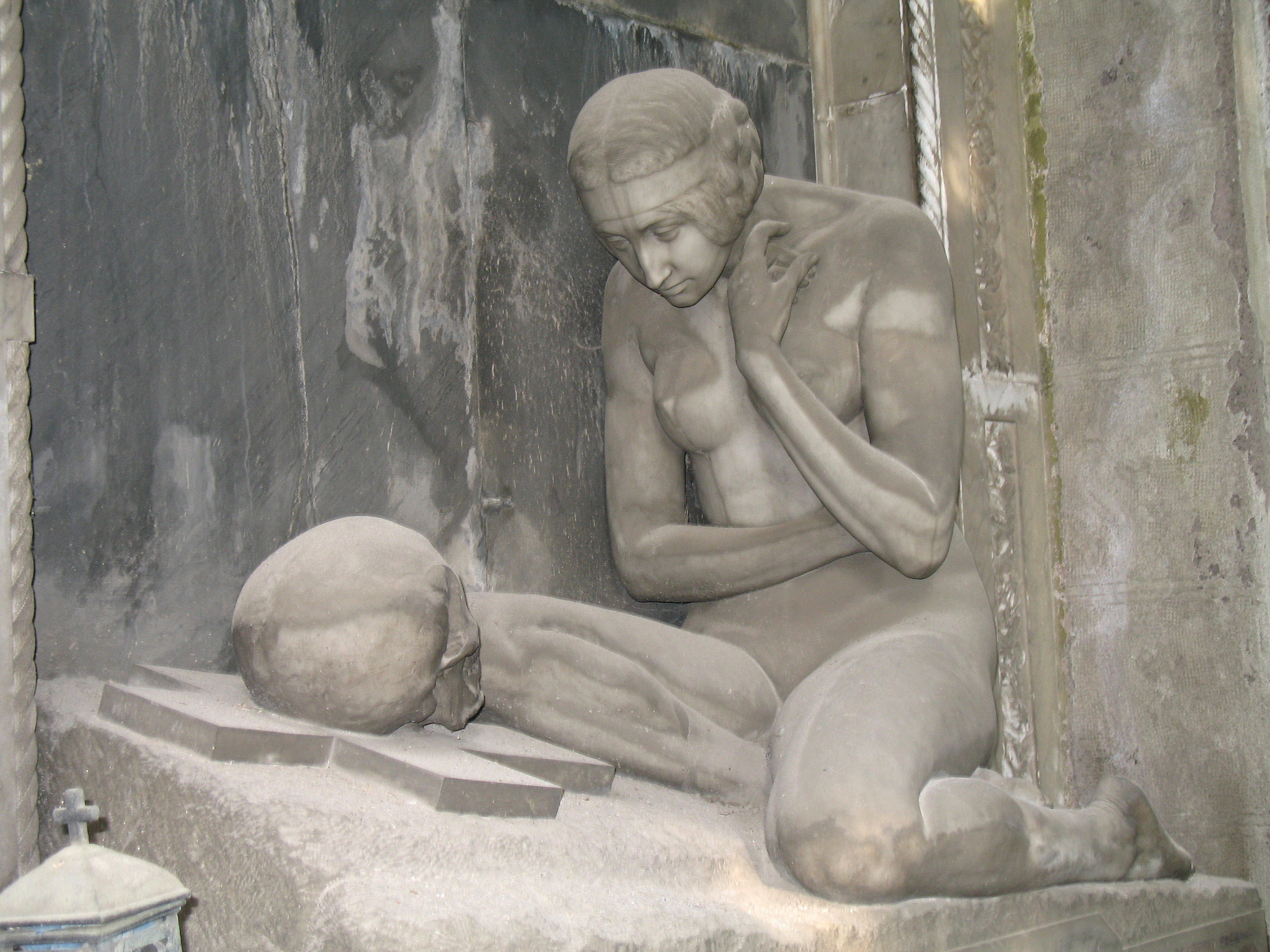 La tomba Lavarello, opera ultima, di gusto Simbolista, dello scultore Demetrio Paernio (Genova, 1851-1912) a Genova, nel Cimitero monumentale di Staglieno.